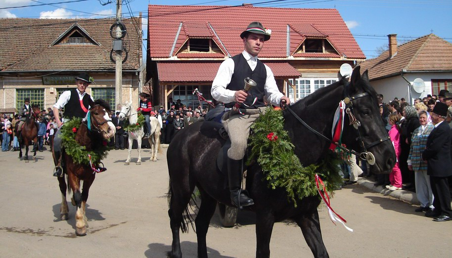 Húsvéti határkerülés, Kézdialmás, Erdély